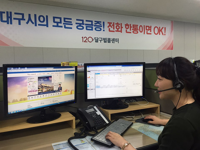 대구광역시 달구벌콜센터